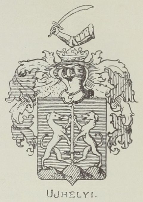 Ujhelyi (Tiszaujhelyi) család címere